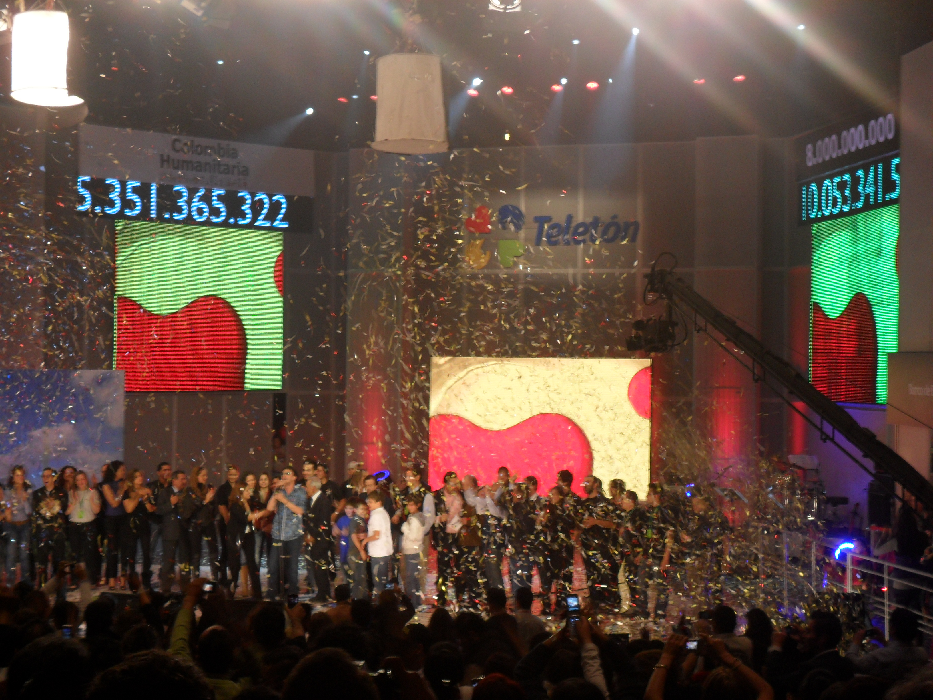 Final de la Teletón 2010 en Colombia con las cifras definitivas.